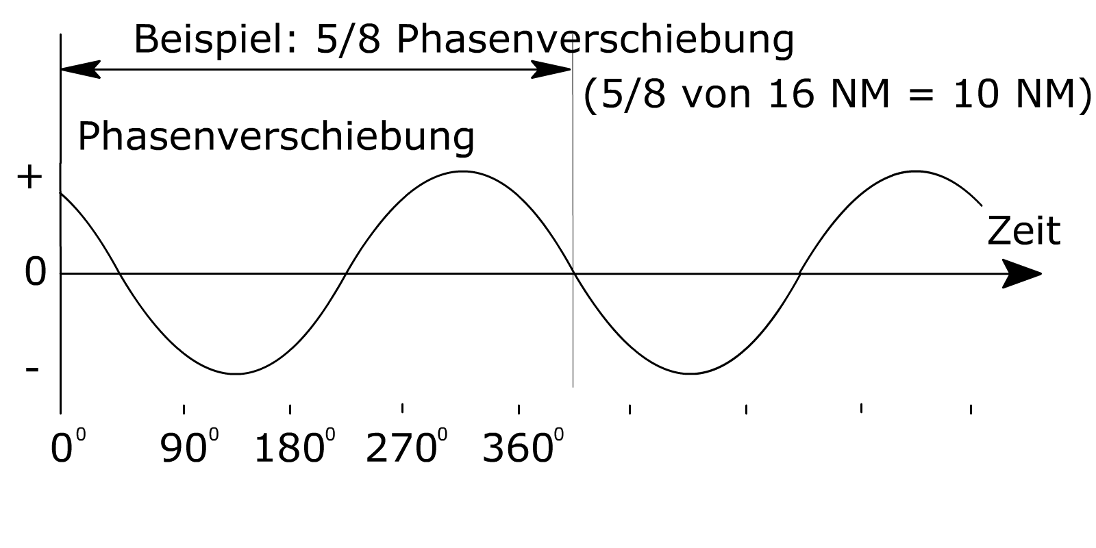 OMEGA Navigationssystem, Funktionsweise